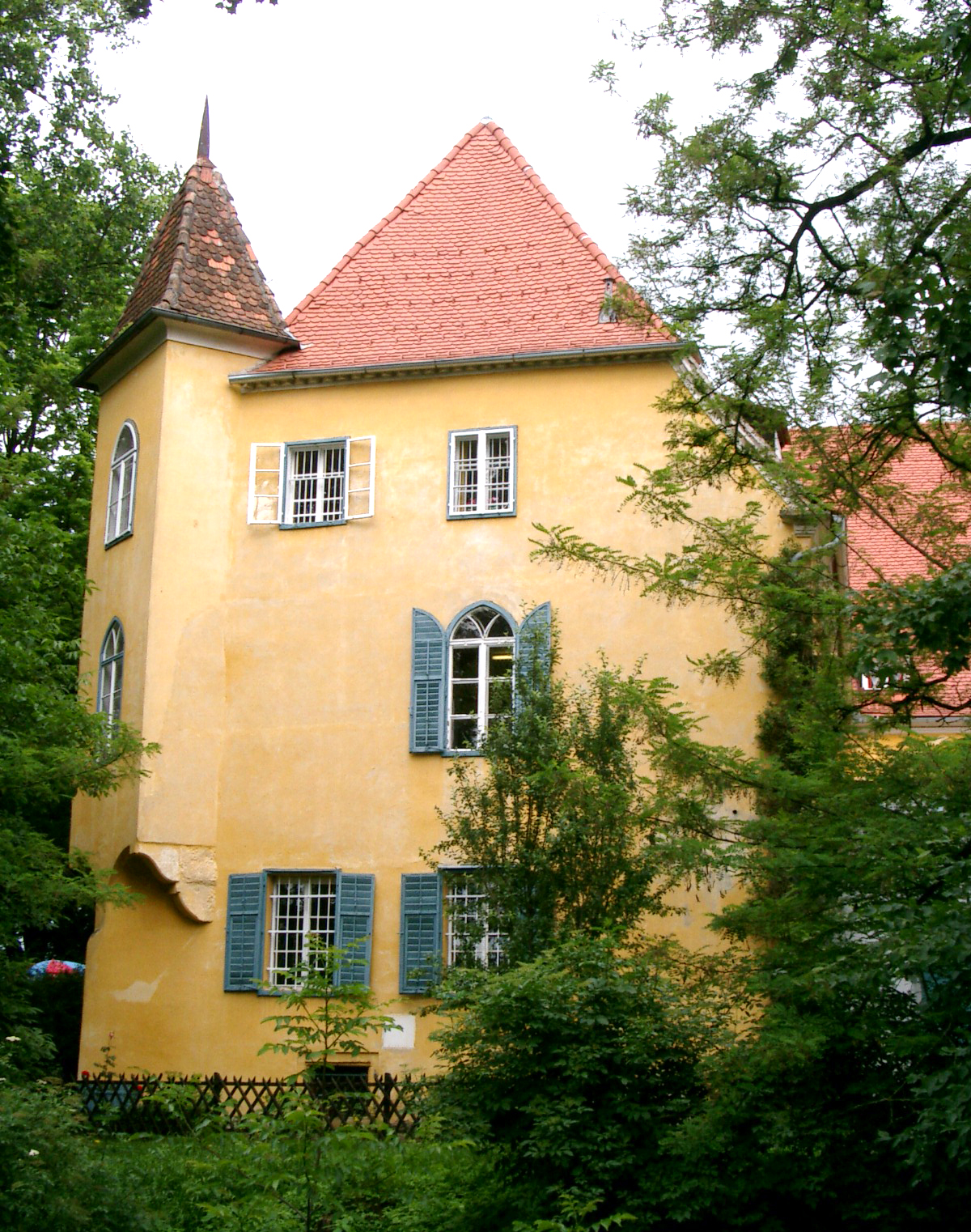 Gjaidhof mit Ummauerung, sog. Schloss Dobl